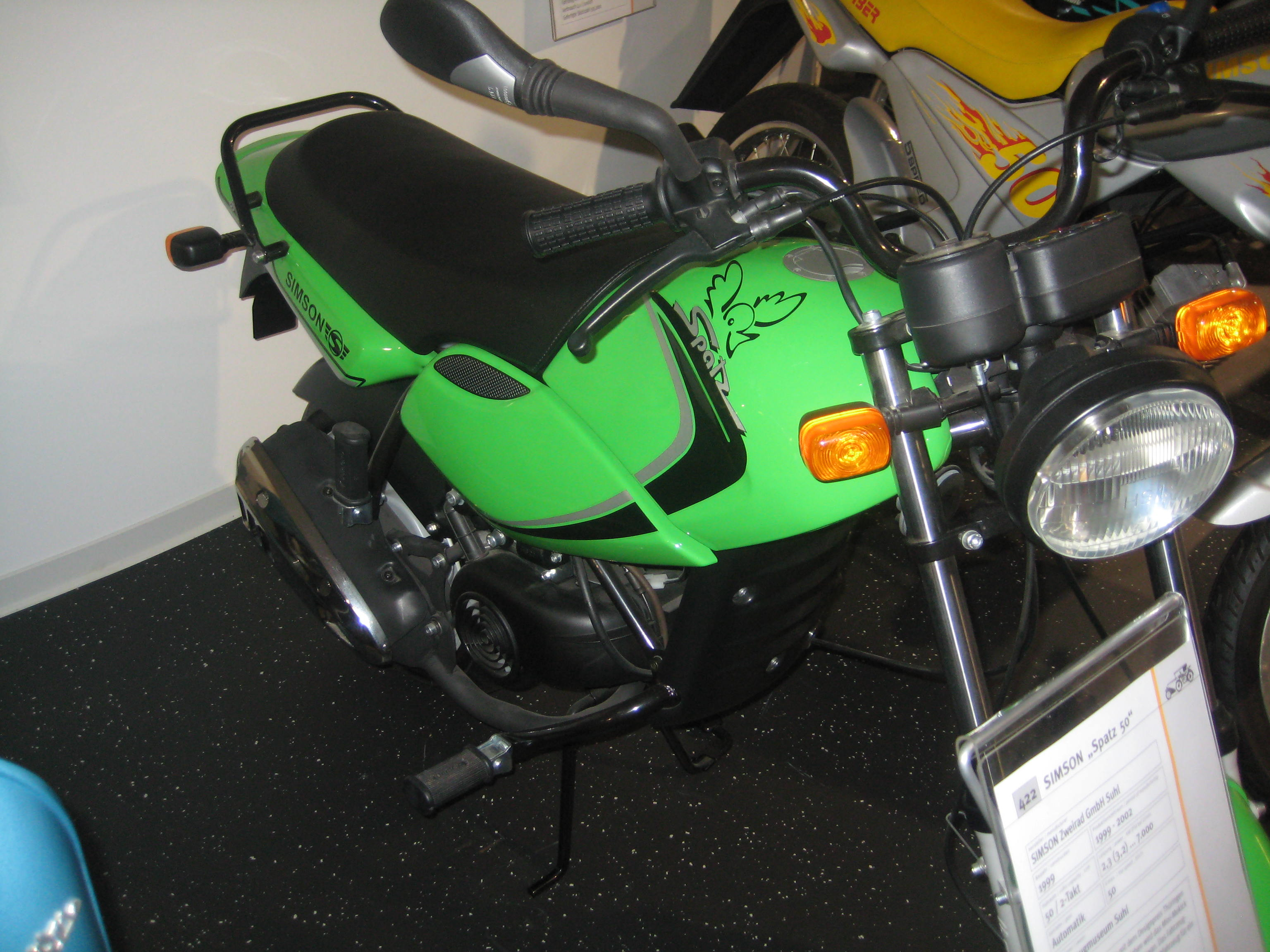 Zdjęcie przedstawiające motorower Simson MSA50 (Spatz 50) będący eksponatem w Fahrzeugmuseum Suhl.